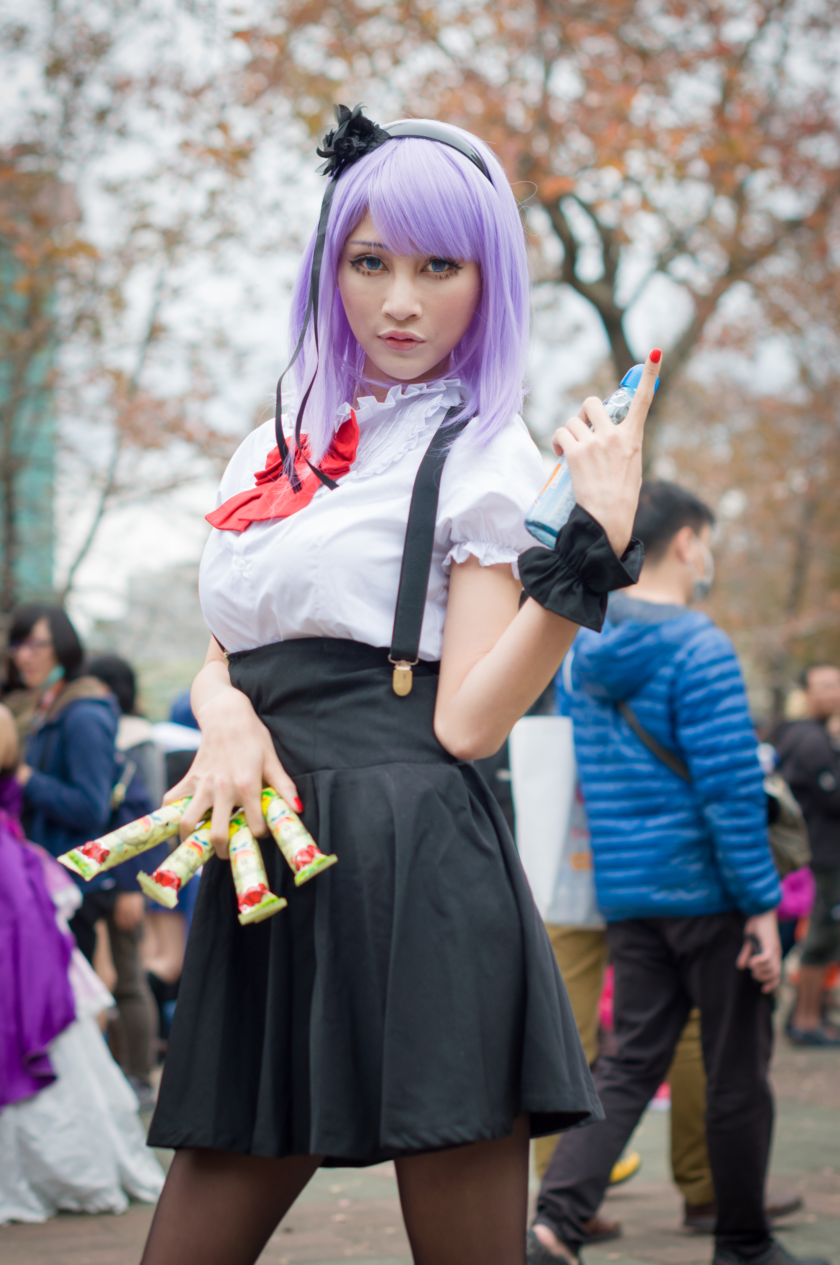 第45屆台灣同人誌販售會，《粗點心戰爭》枝垂螢cosplayer。